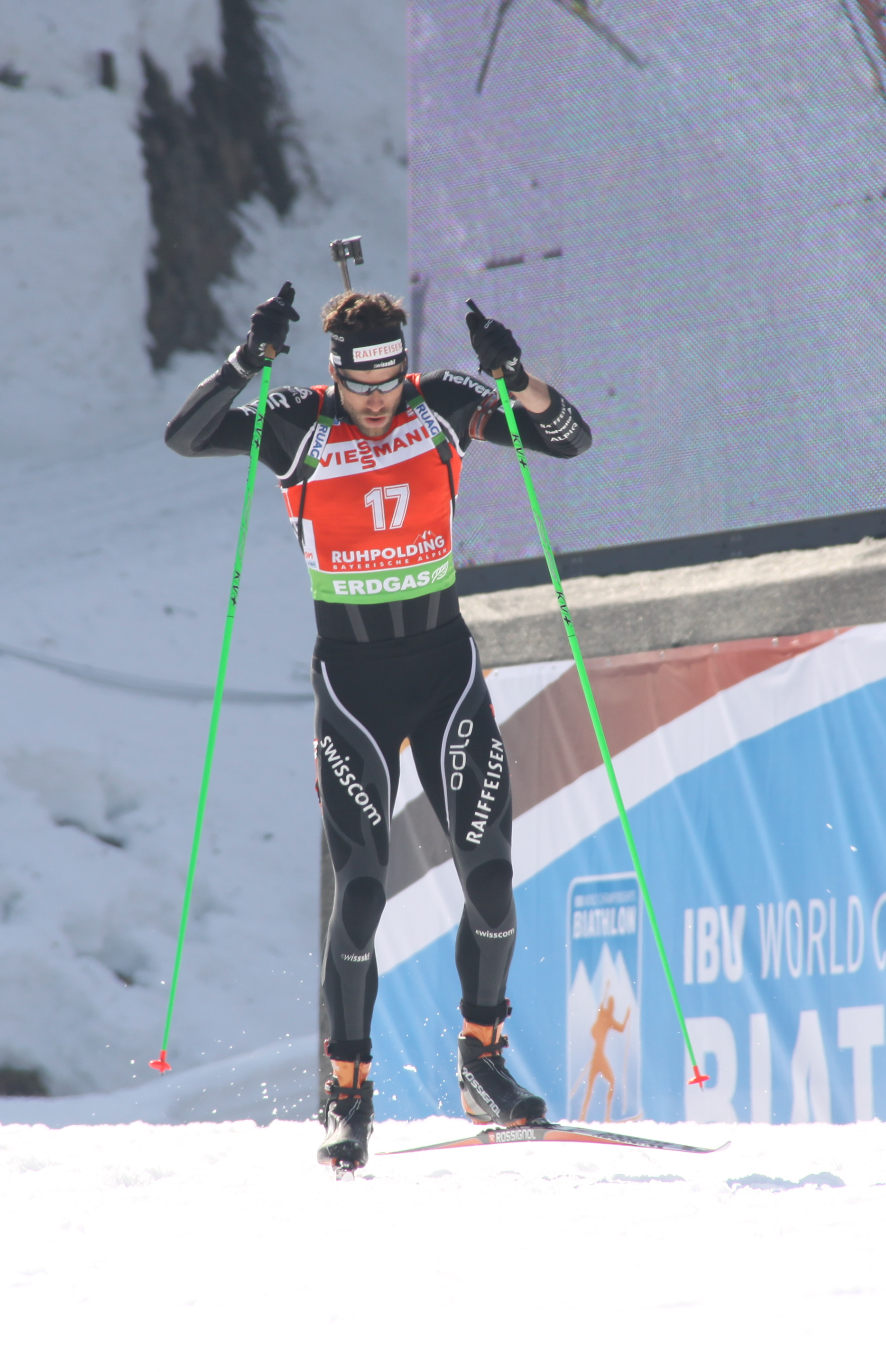 Simon Hallenbarter SUI